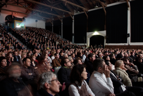 Vollbesetzte Reithalle.